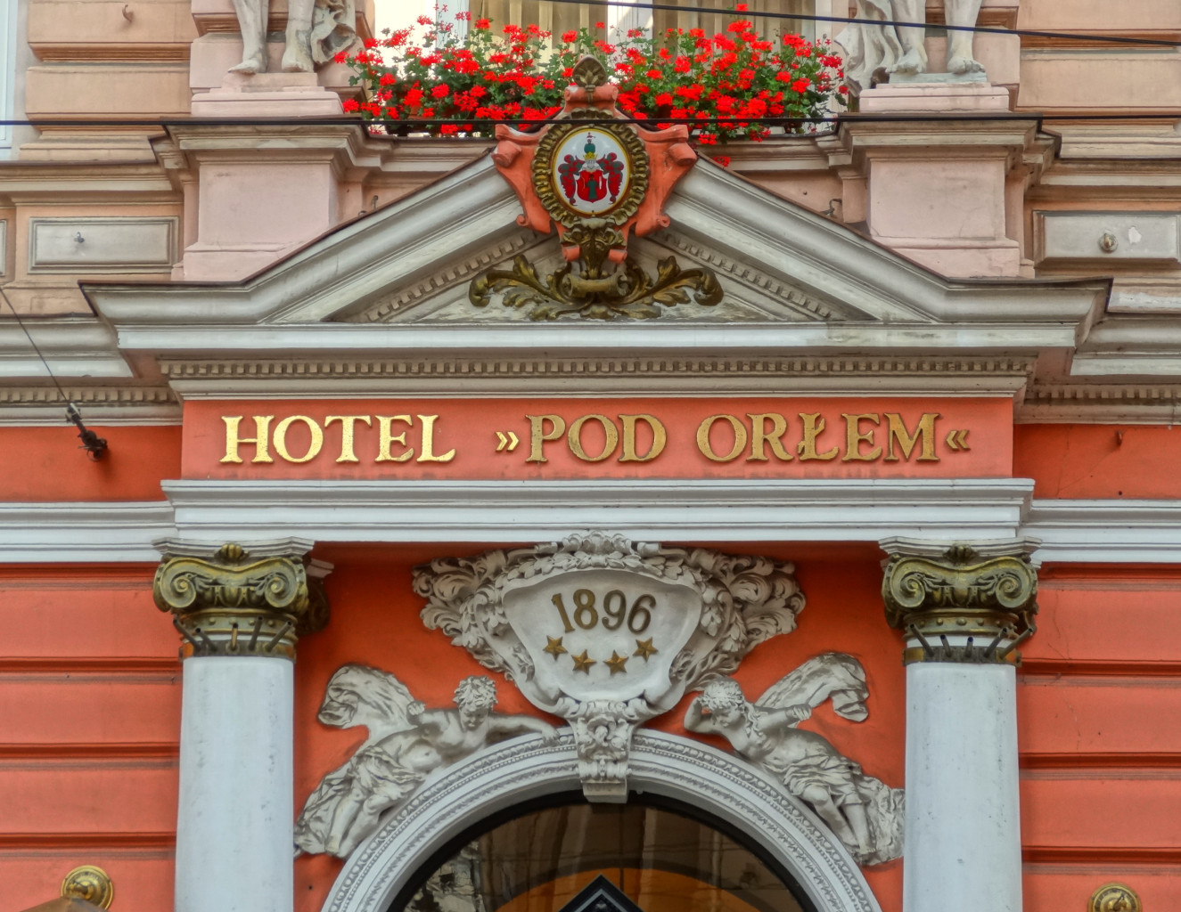 Hotel Pod Orłem w Bydgoszczy przy ul. Gdańskiej 14 (zbud. 1896, Józef Święcicki); na zdj. detale architektoniczne budynku